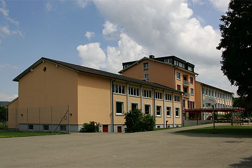 Schulhaus in Brislach